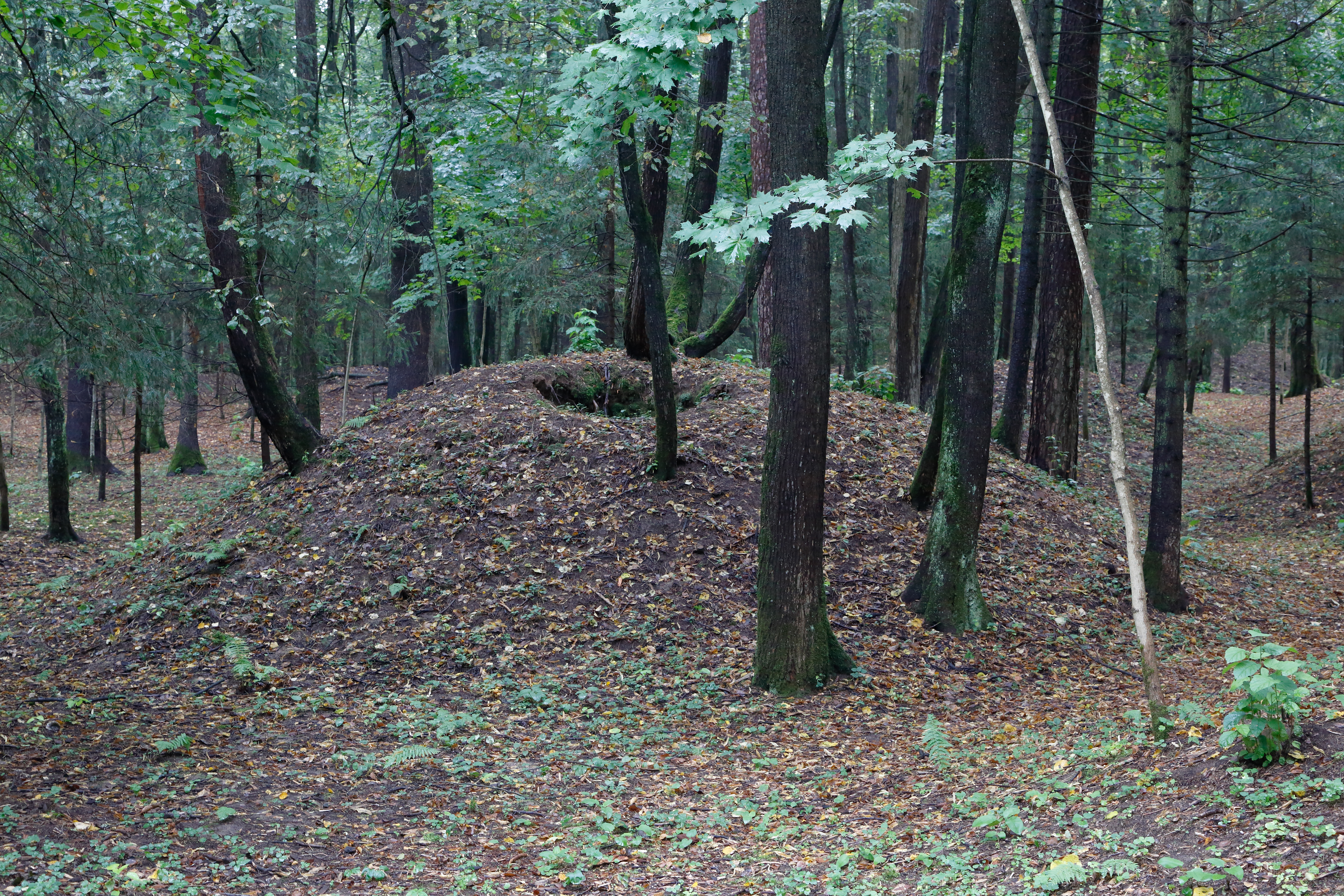 Курганы-захоронения в спортивном парке имени Героя России Ларисы Лазутиной, г. Одинцово, Московская область, Россия